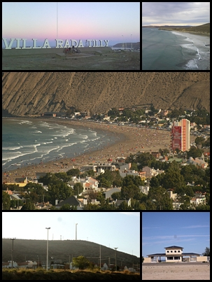 Montaje de Rada Tilly